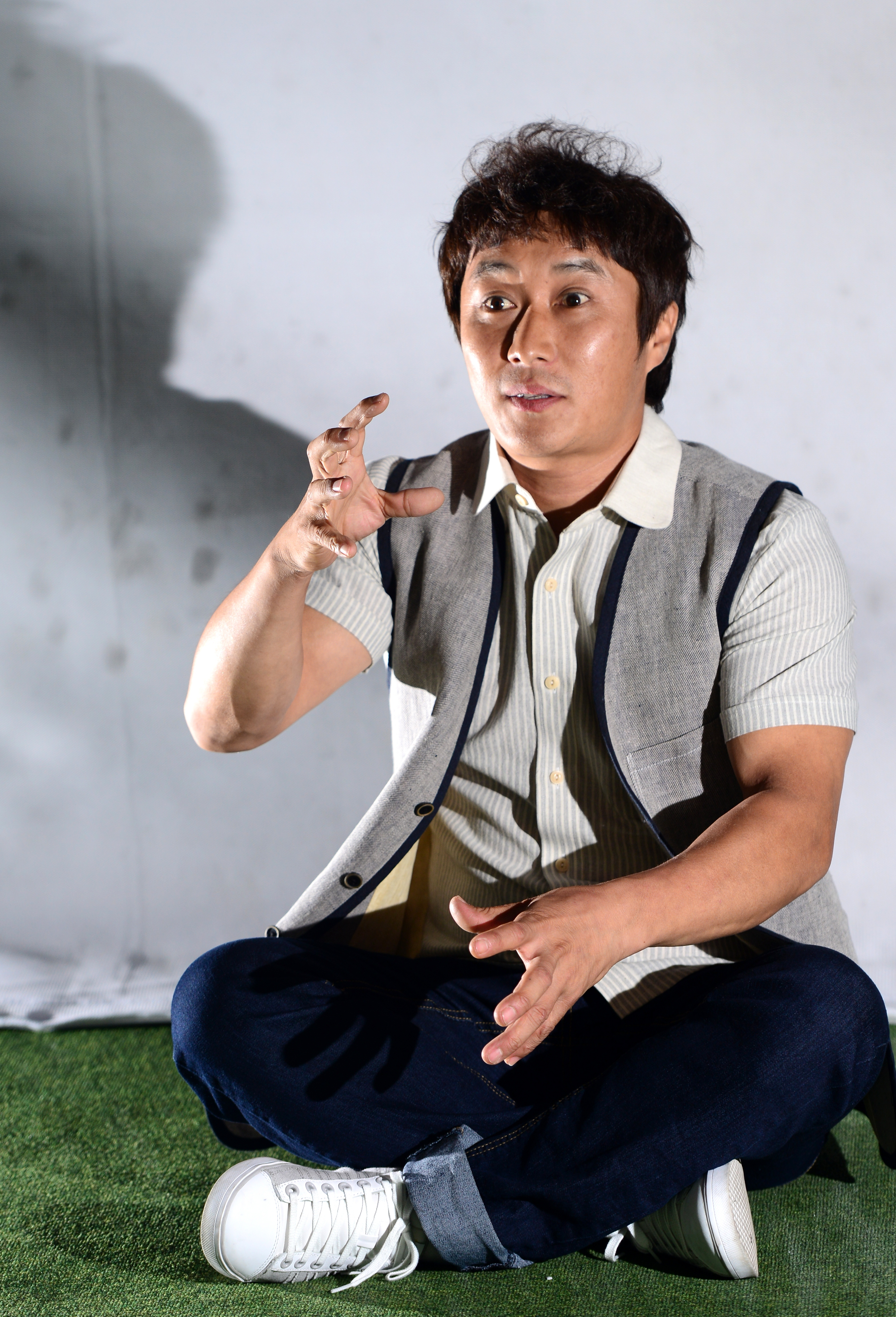 120620 김병만